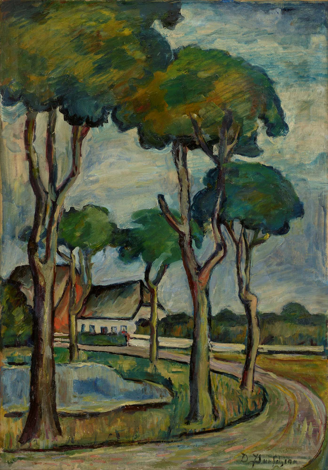 Waldbäume mit Bauernhaus